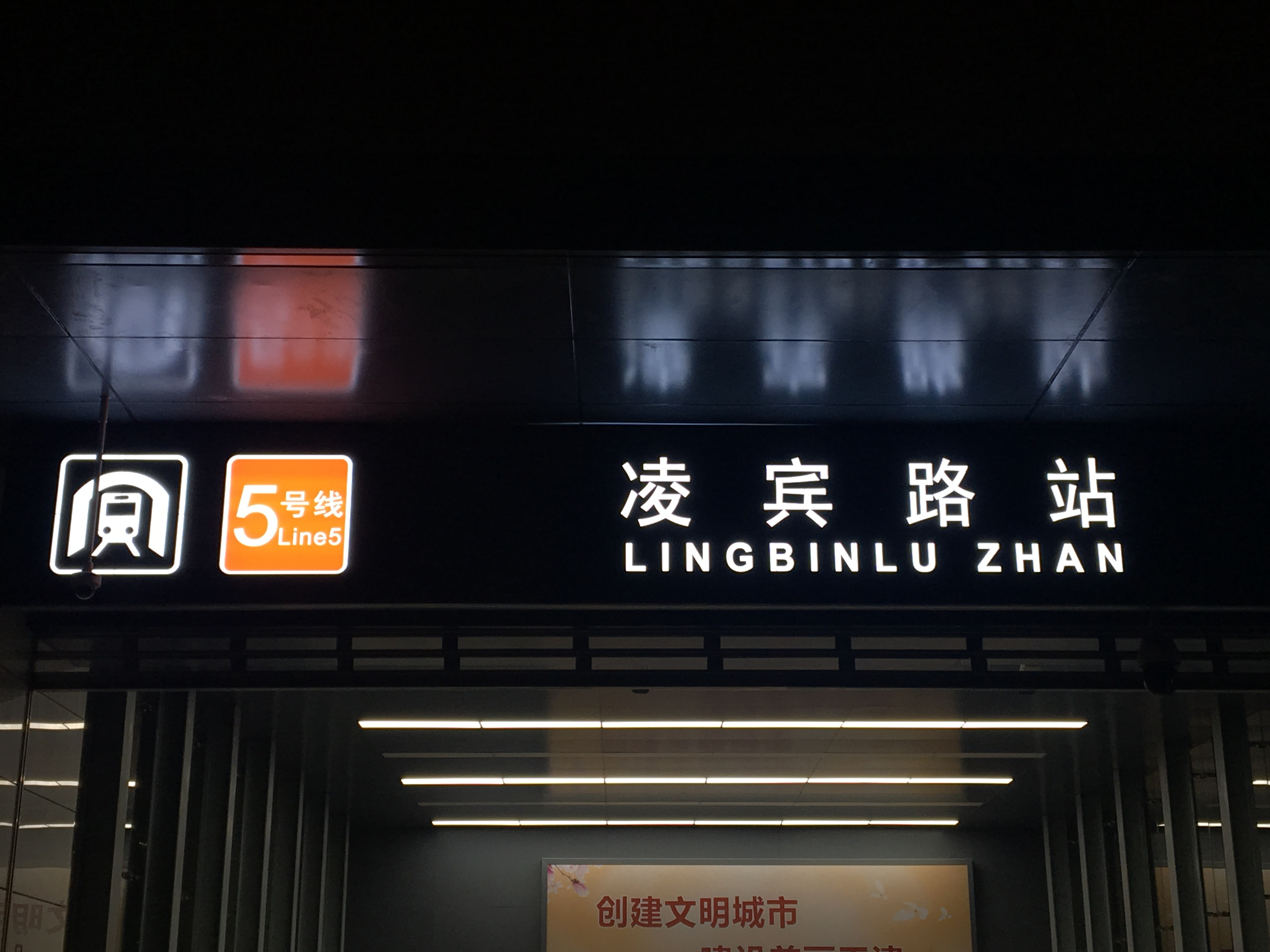 天津地铁凌宾路站B出入口